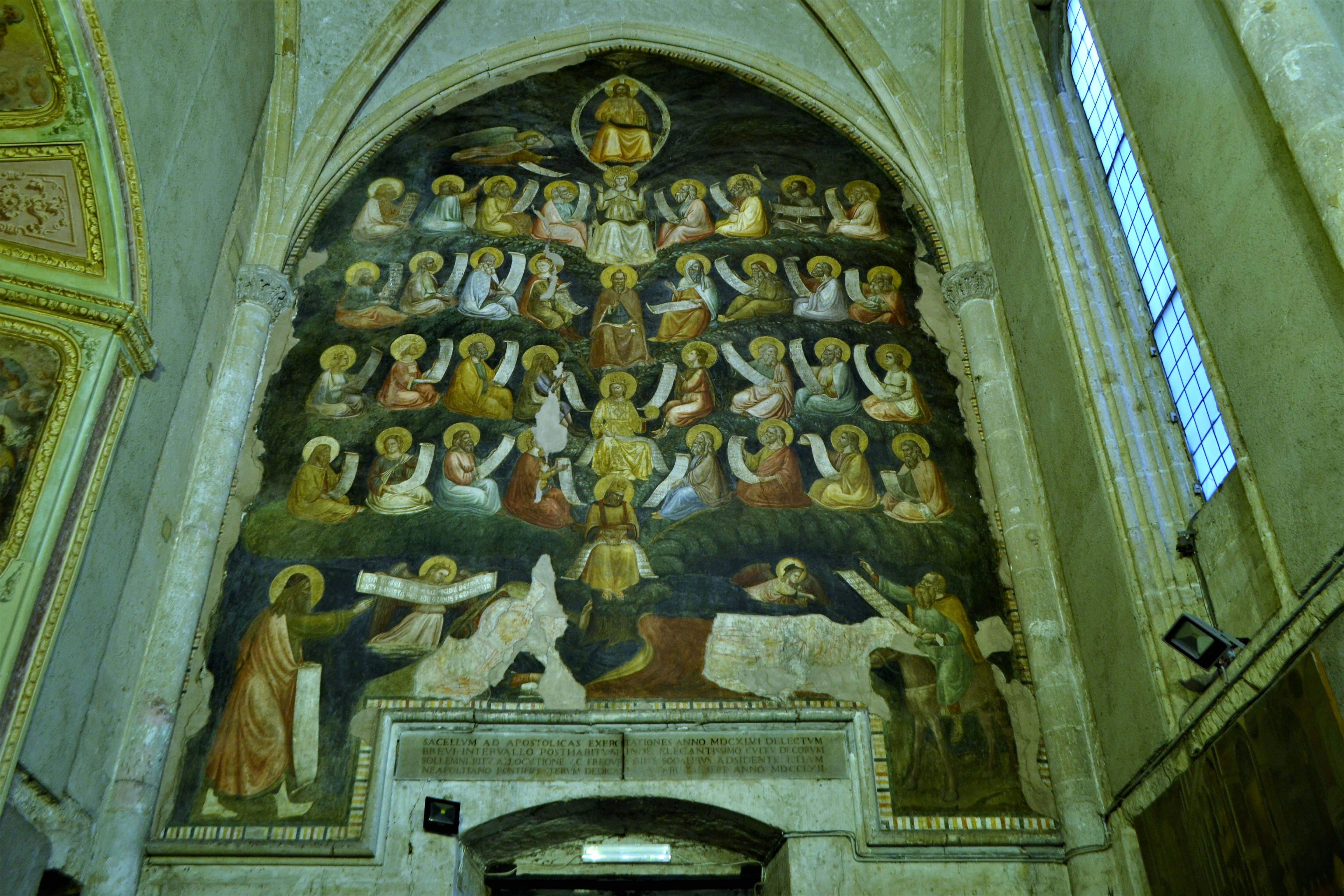 Albero di Jesse, cappella degli Illustrissimi nel Duomo di Napoli, 1315 c.